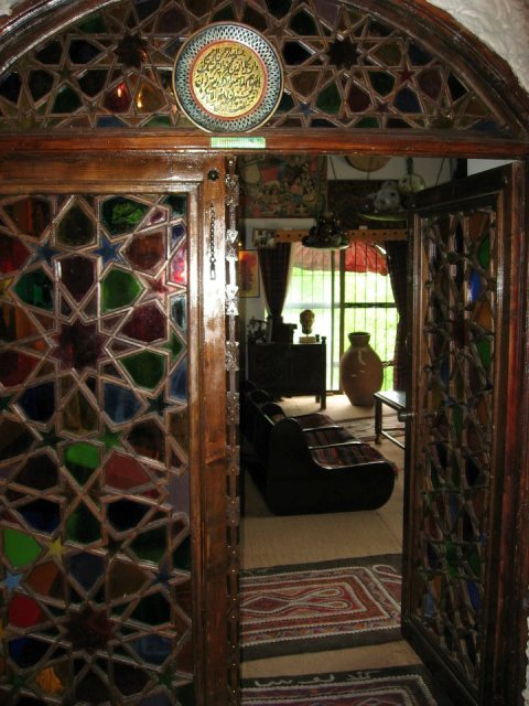 یکی از بخش های موزه کندلوس